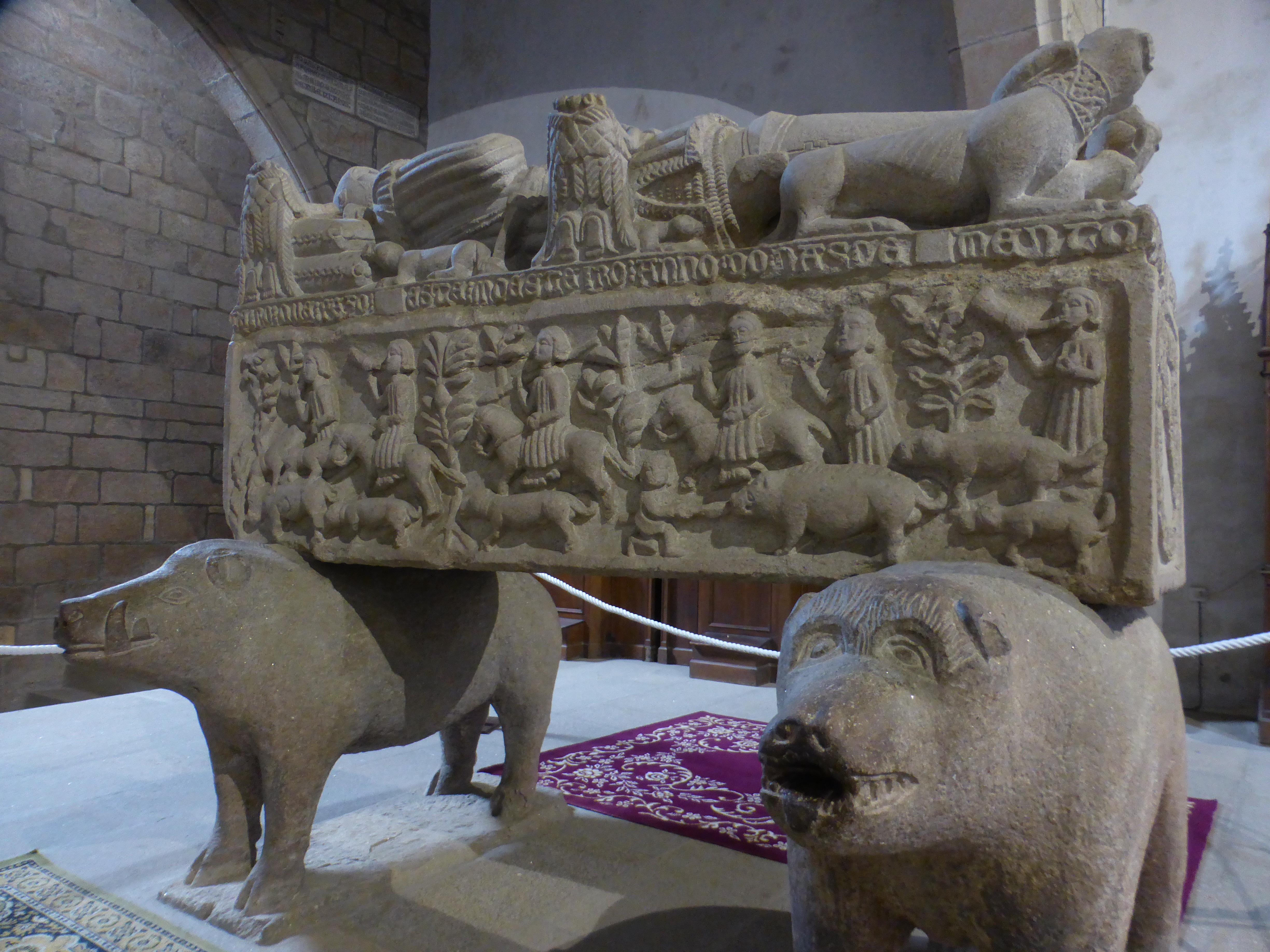 En la iglesia del monasterio de San Francisco, de Betanzos. Estilo gótico del siglo XIV.